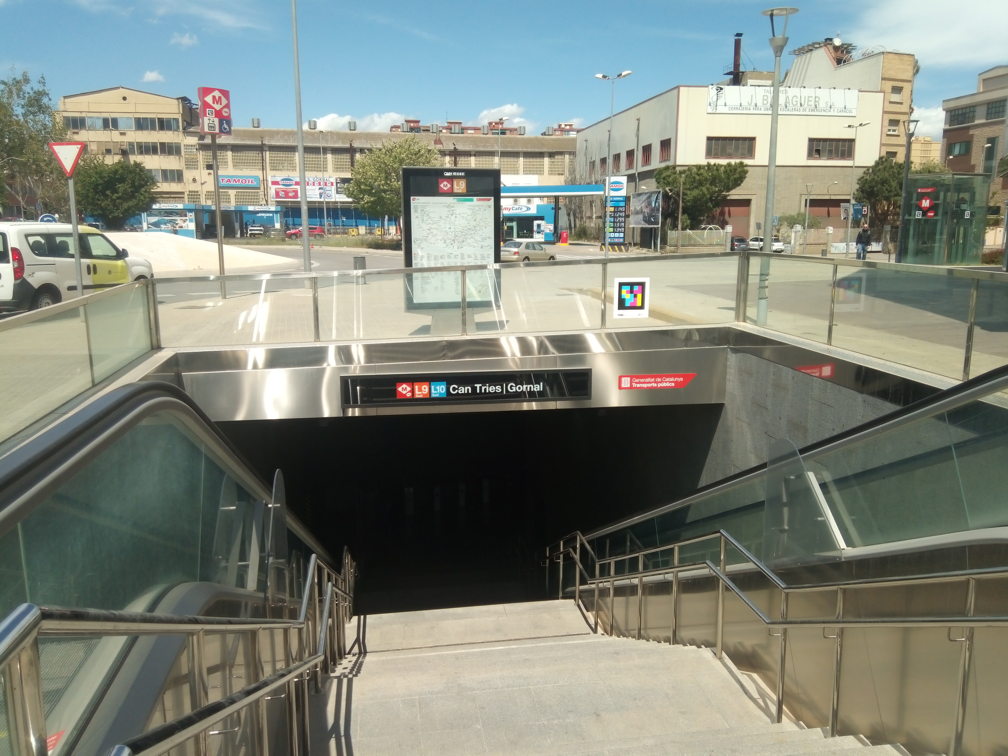 Entrada a l'estació de metro de la línia 9 Can Tries - Gornal, ubicada a l'Hospitalet de Llobregat